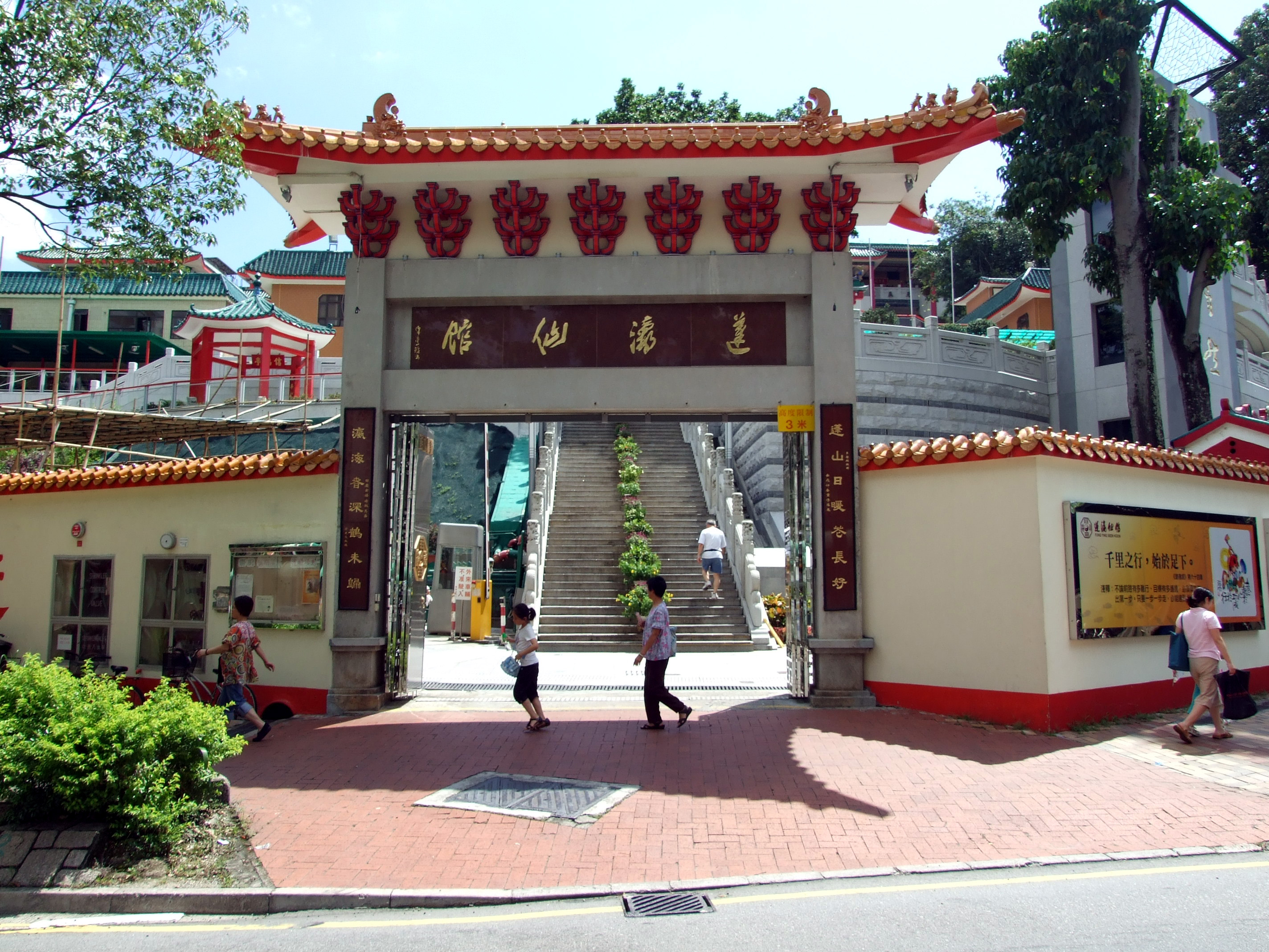 中文（香港）: 蓬瀛仙館 正門